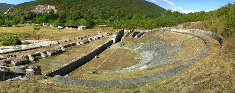 Dettaglio del teatro romano di Amiternum situato nei pressi di San Vittorino (L'Aquila)